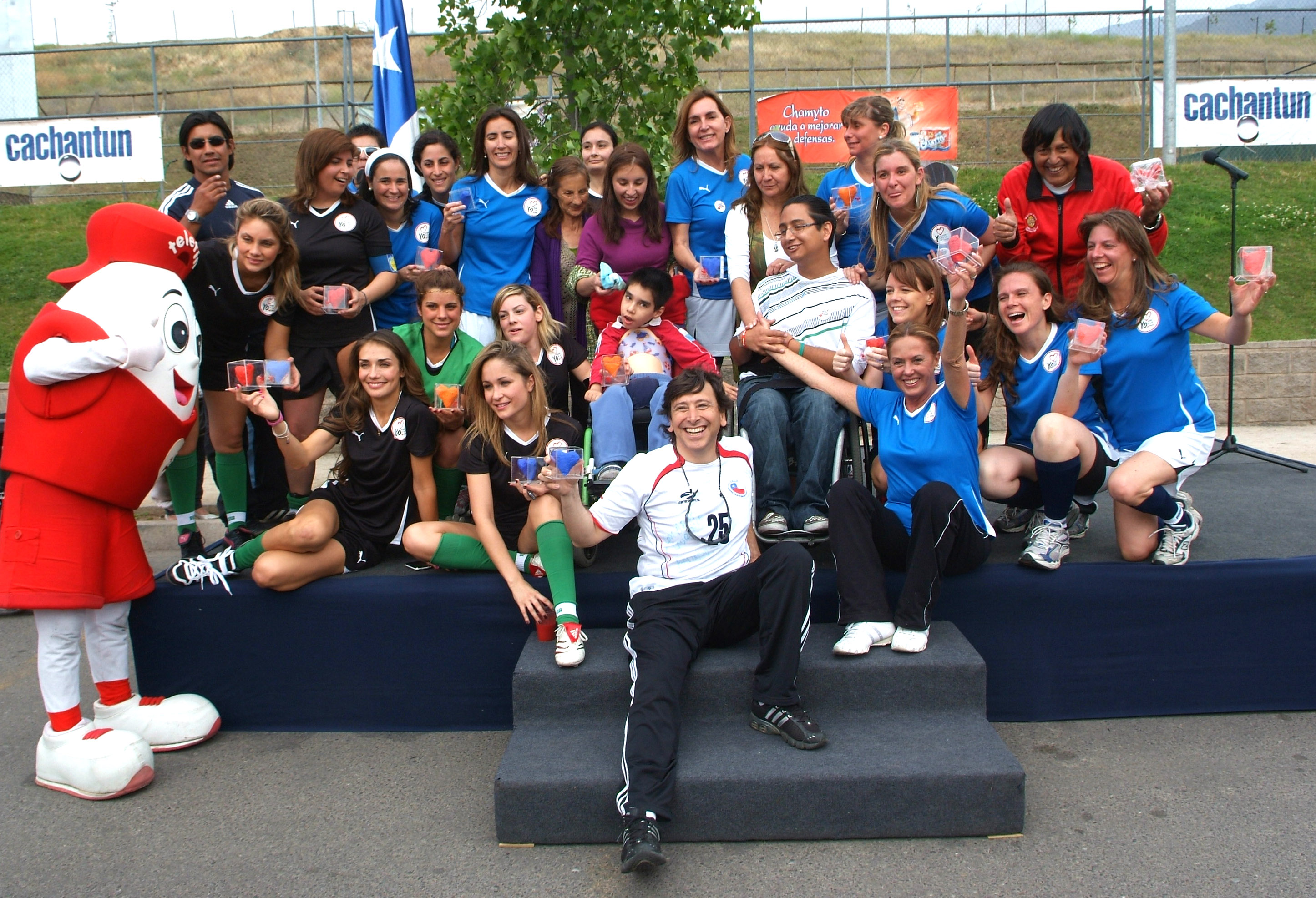 Fútbol Femenino Teletón 2010